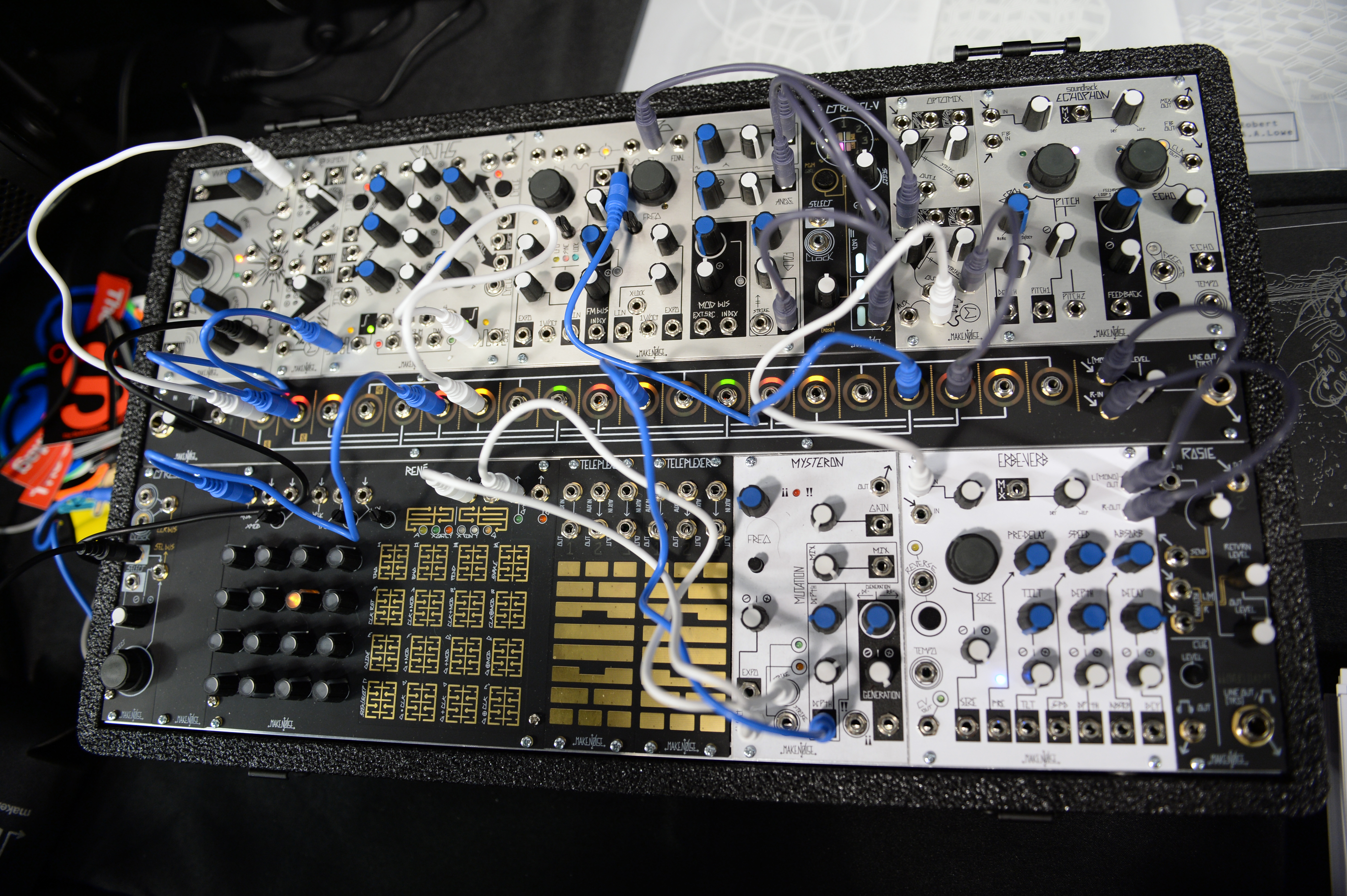 MakeNoise_System